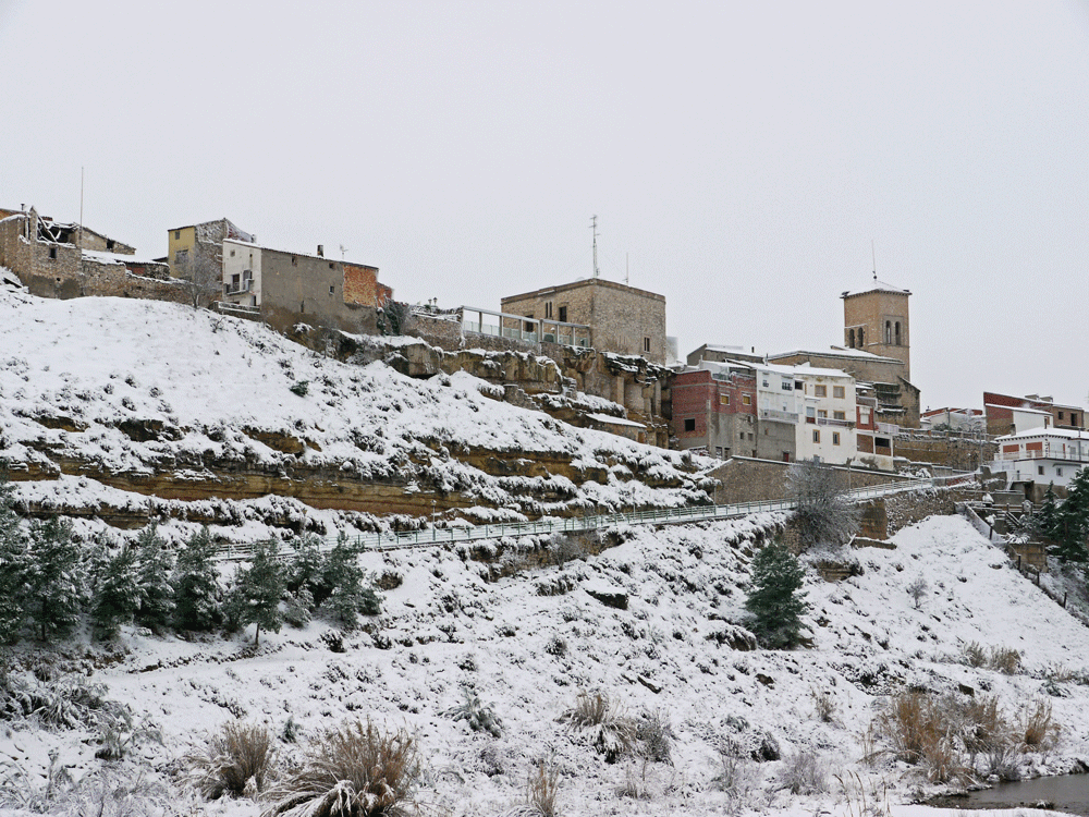 Vista de Nonasp nevat